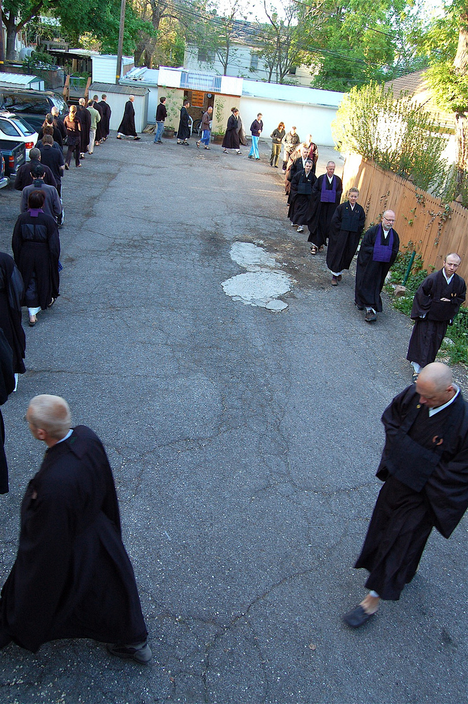 Members of Kanzeon Zen Center during kinhin